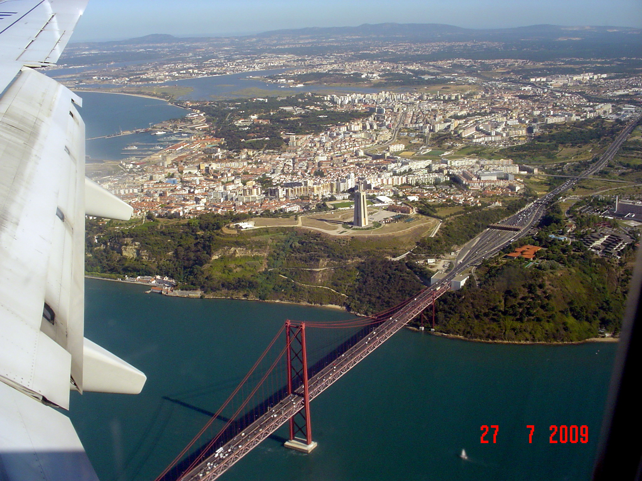 PORTUGAL - LISBOA - PONTE 25 DE ABRIL - Travessia do rio Tejo